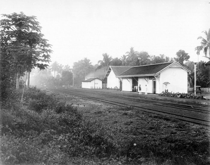 Negatief. Sation op de halte Pakisadji op de spoorlijn Malang Bita op Java. Station Pakisadji op de spoorlijn Malang -Blitar op Java